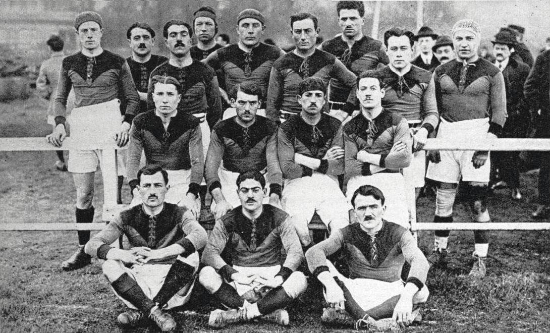 L'US Montalbanaise, en février 1921.